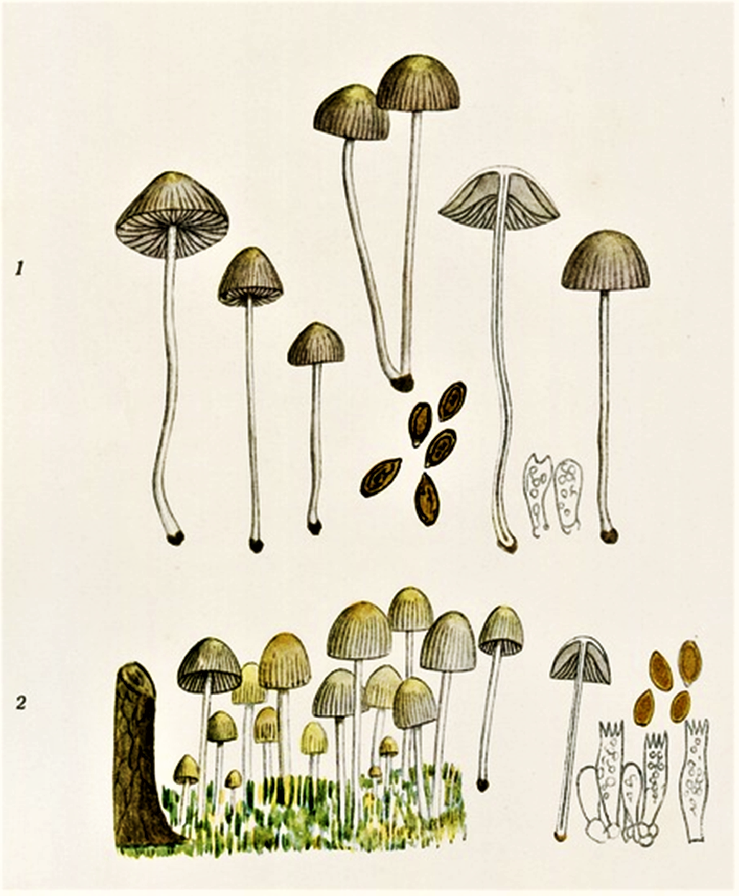 Giacomo Bresadola: Psathyrella atomata (Fr.) Quél. (1872), Mémoires de la Société d'Émulation de Montbéliard, ser. 2, 5: 153 (1872) und Psathyrella disseminata (Pers.) Quél. (1872), heute Coprinellus disseminatus (Pers.) J.E.Lange, Dansk botanisk Arkiv, 9 (6): 93 (1938)